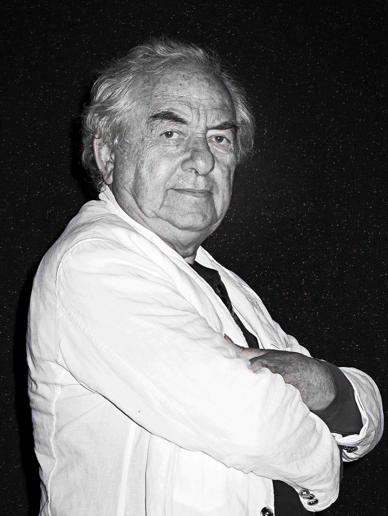 Daniel Buren lors du Festival International du Livre d'Art et du Film (FILAF), Perpignan 23 juin 2014